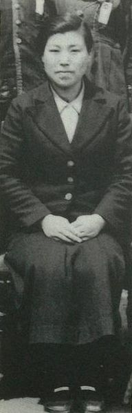 遠野小学校勤務時代の小笠原露（旧姓高瀬）。1940年頃。